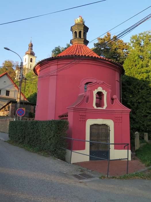 Kaple Narození Panny Marie, Horky nad Jizerou.